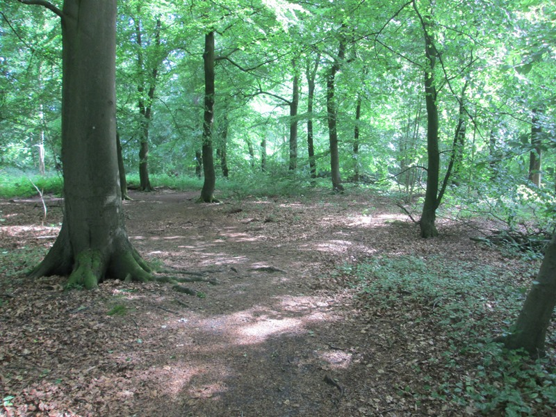 Frueskoven i Flensborg.